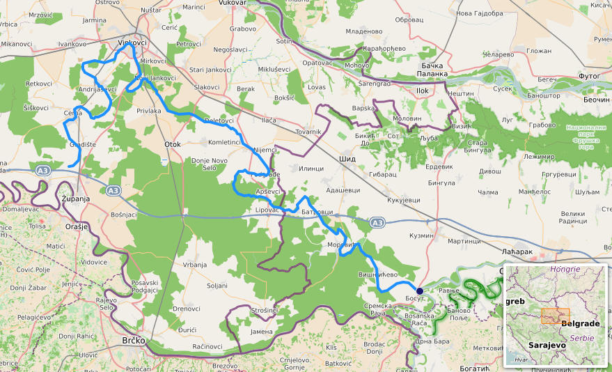 carte réalisée sur umap [1] This map may be incomplete, and may contain errors. Don't rely solely on it for navigation.